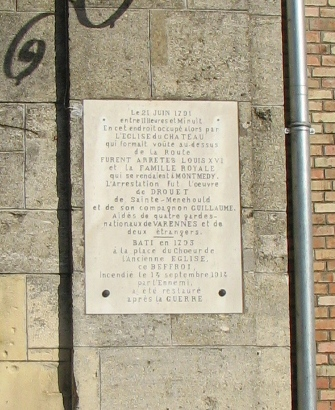 Plaque rappellant l'arrestation de Louis XVI, le 21 juin 1791, sur la tour homonyme à Varennes-en-Argonne (Meuse).